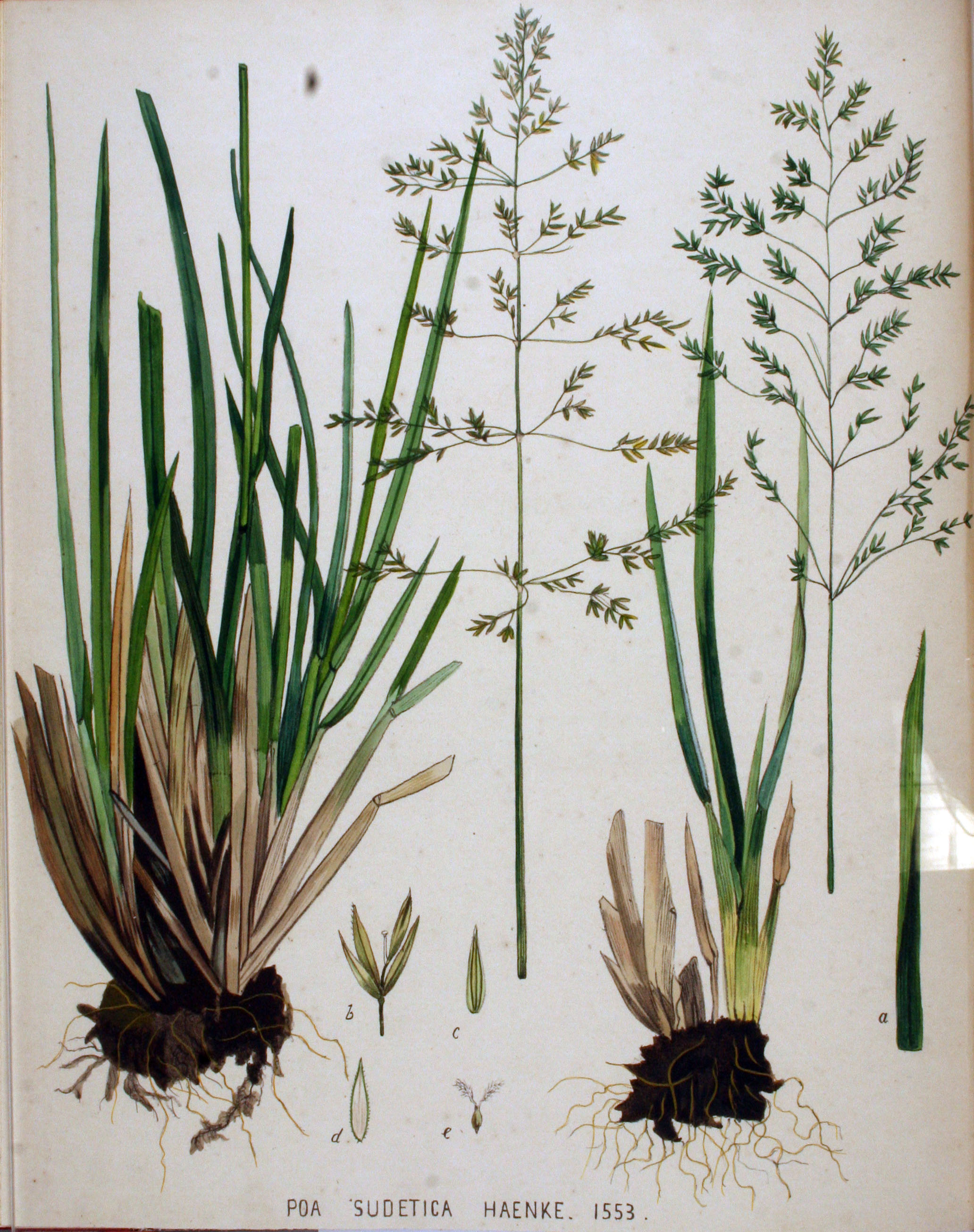 Poa chaixii Vill. (Syn. Poa sudetica Haencke)